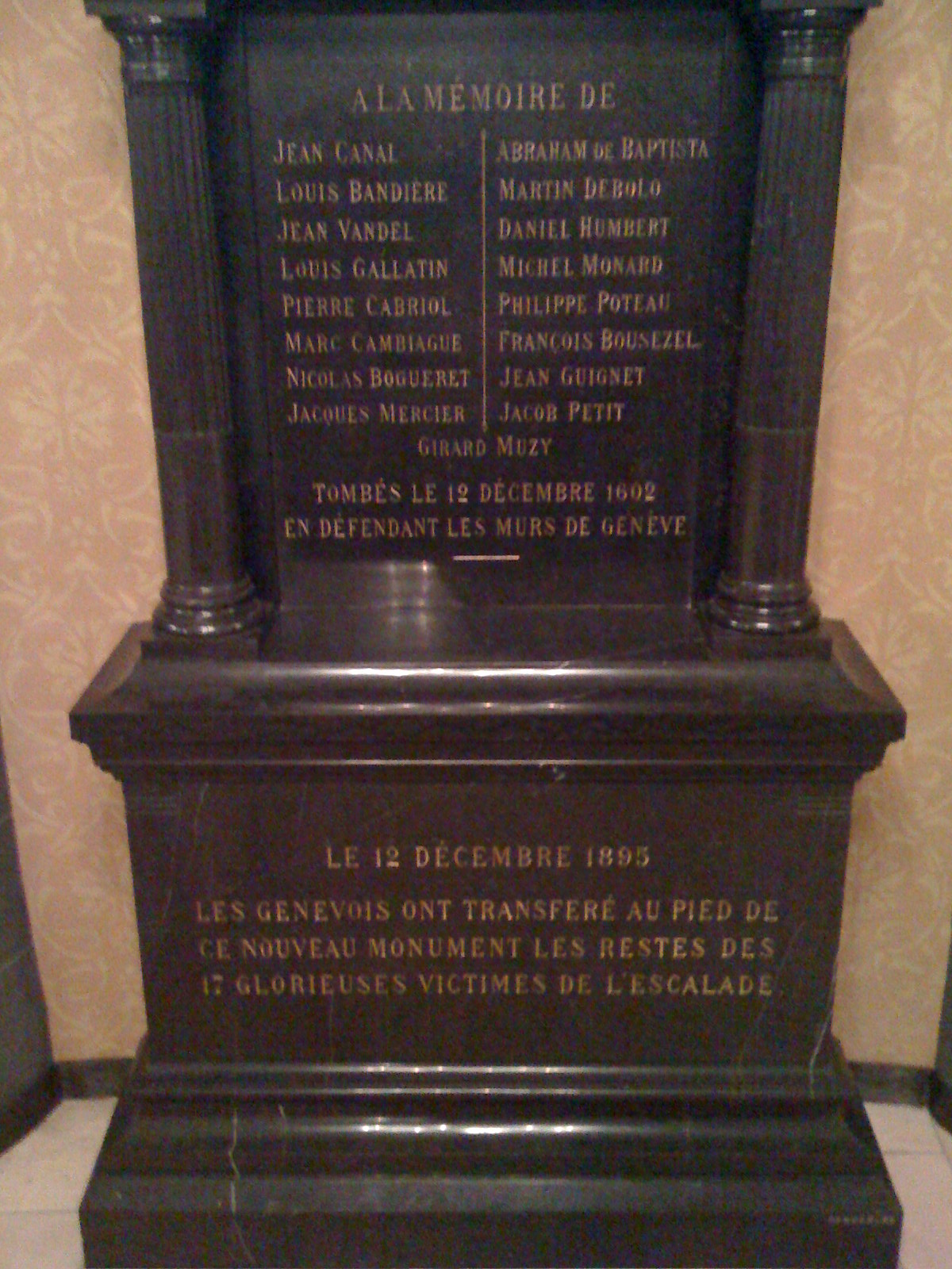 Monument aux morts de l'Escalade dans le temple de Saint-Gervais à Genève (Suisse)